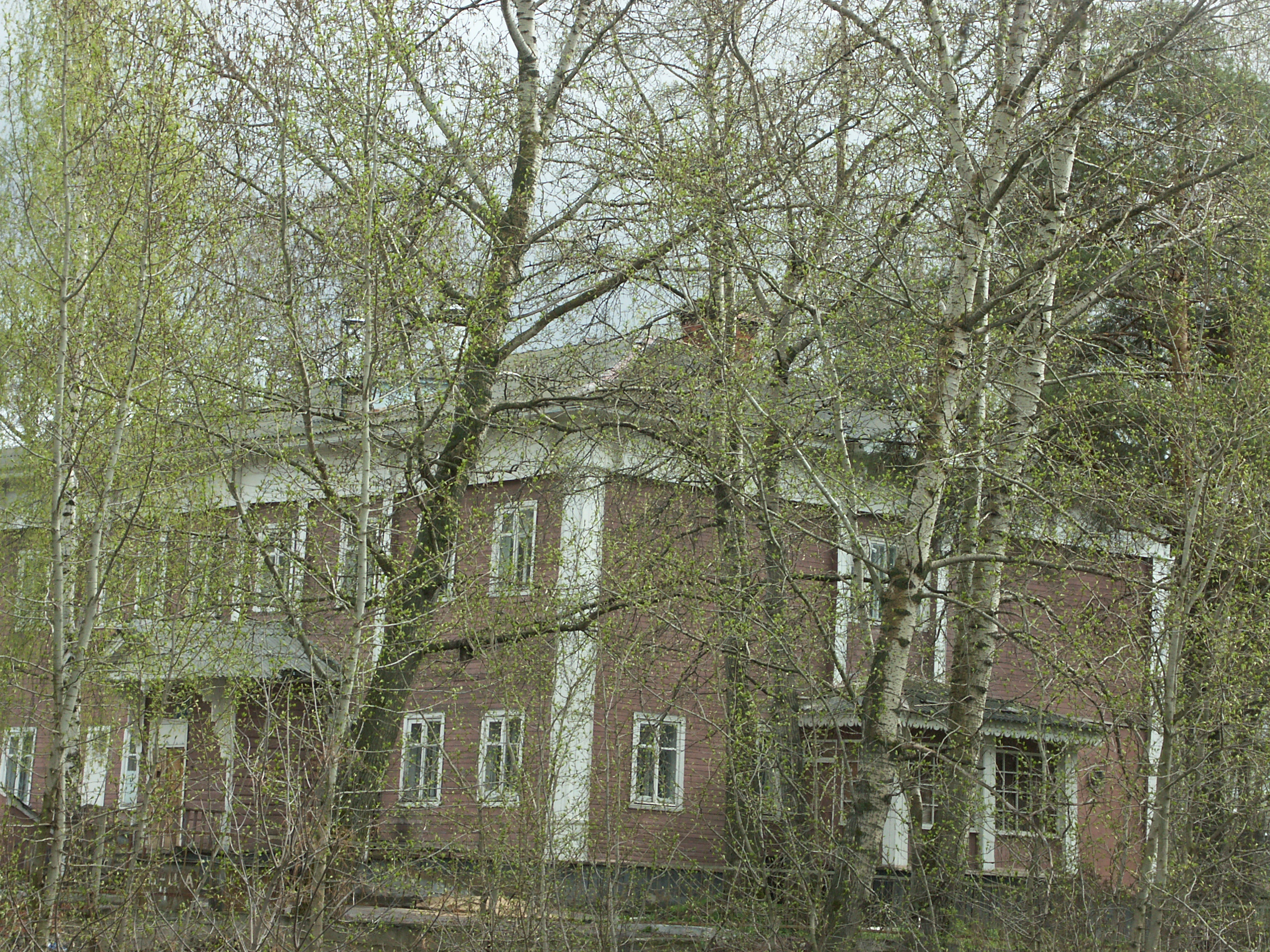 Больница №4 Автор: User:Glaue2dk Дата: 2006-05-08